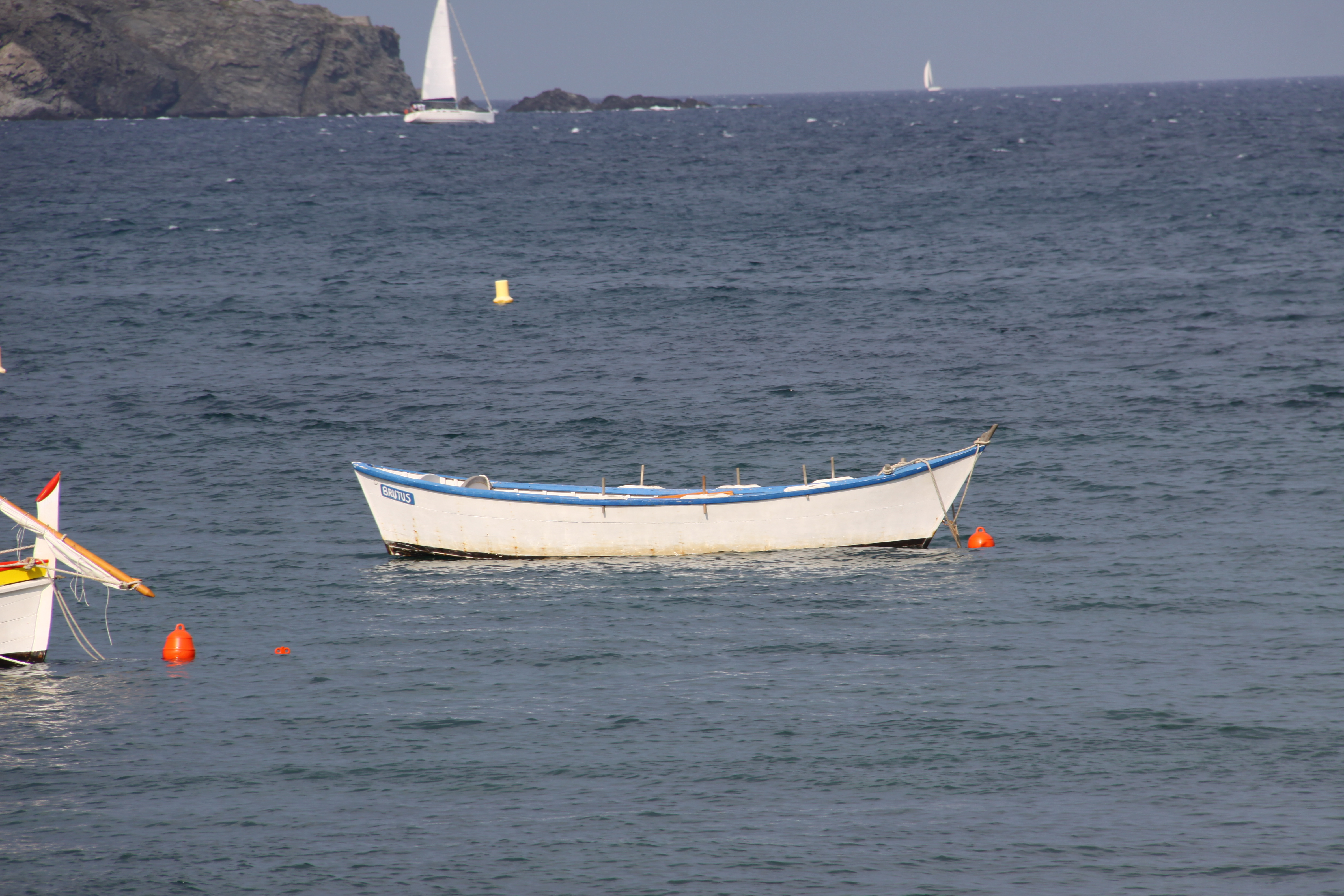 "Brutus", au mouillage, à la plage de Paulilles. "Brutus" est une bette (barque à fond plat) construite durant la première partie du vingtième siècle à Martigues. Elle a servi à la pêche en étang et au déchargement de fret depuis les gros navires vers la terre. Cette bette de travail mesure 5,97 mètres de long, 2,06 mètres de large et 0,75 de creux au maître bau. Elle était propulsée à l' aide de plusieurs paires de rames ou d' une perche. C' est une embarcation stable et puissante. "Brutus" a été restaurée en 2009. Elle est conservée sur le site de l' Anse de Paulilles appartenant au Conseil Général des Pyrénées-Orientales. Fiche inventaire: 08-03-2005. Site de Paulilles (près de Port-Vendres), Pyrénées-Orientales, France.